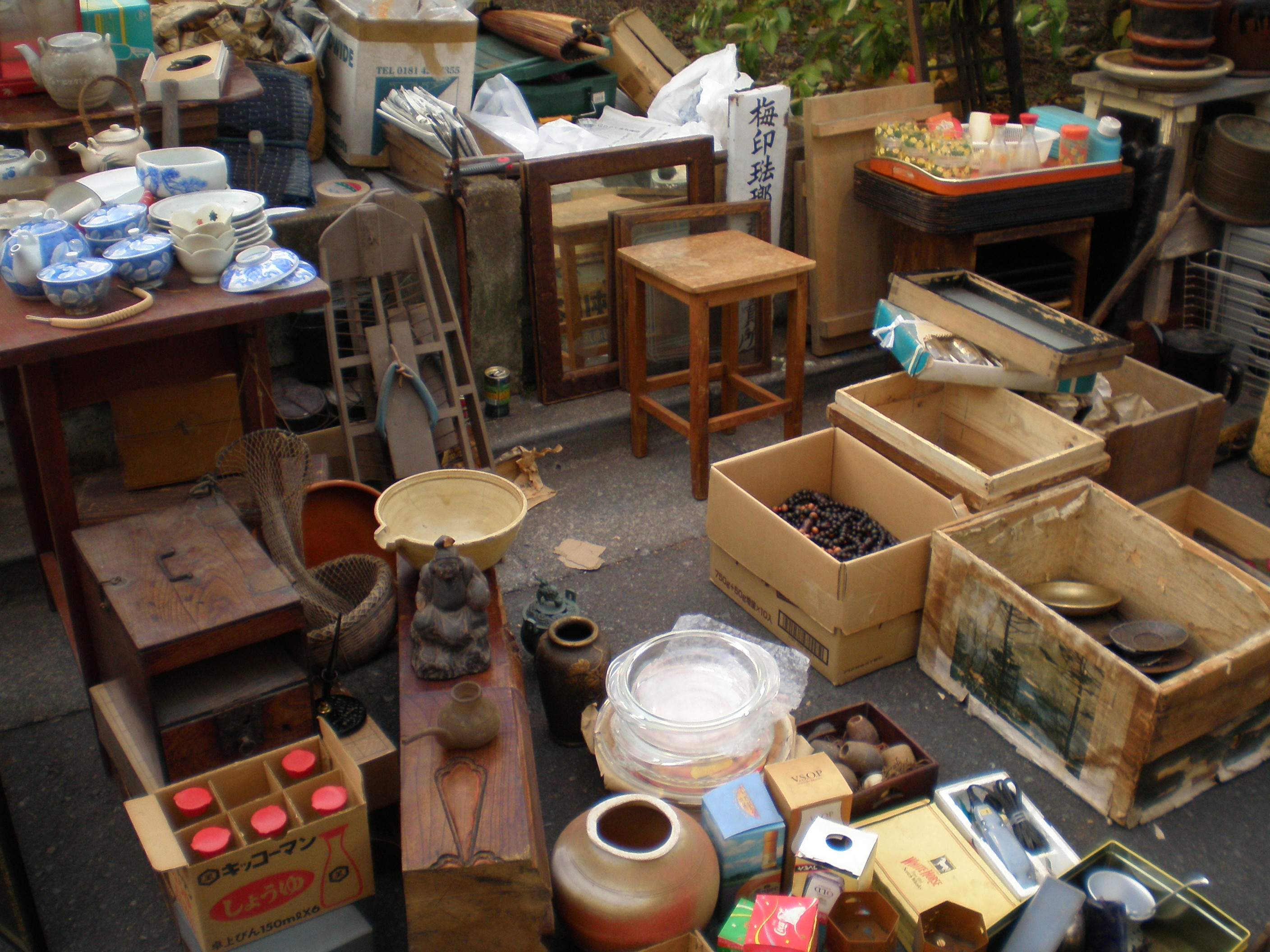 A Setagaya Boro-ichi (traditional flea market) shop in Setagaya, Tokyo.